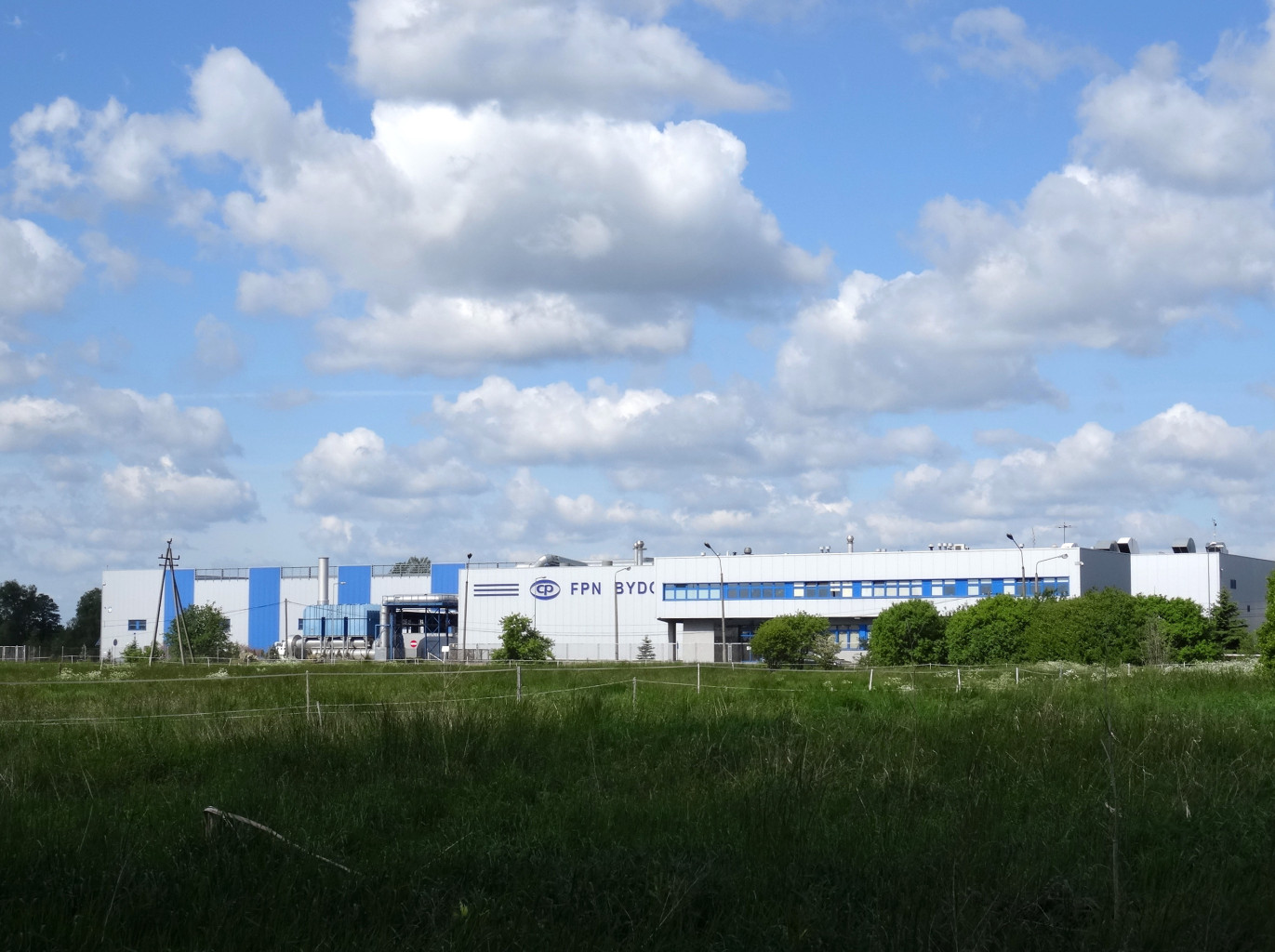 Fabryka Puszek Napojowych Can-Pack S.A. przy ul. Kobaltowej 2 w Bydgoszczy (Osowa Góra)